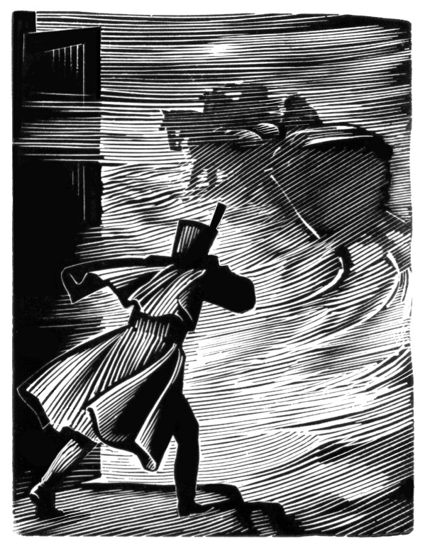 А.С. Бакулевский. Иллюстрация к повести А.С. Пушкина «Метель». 5х7 см. 1983 г.